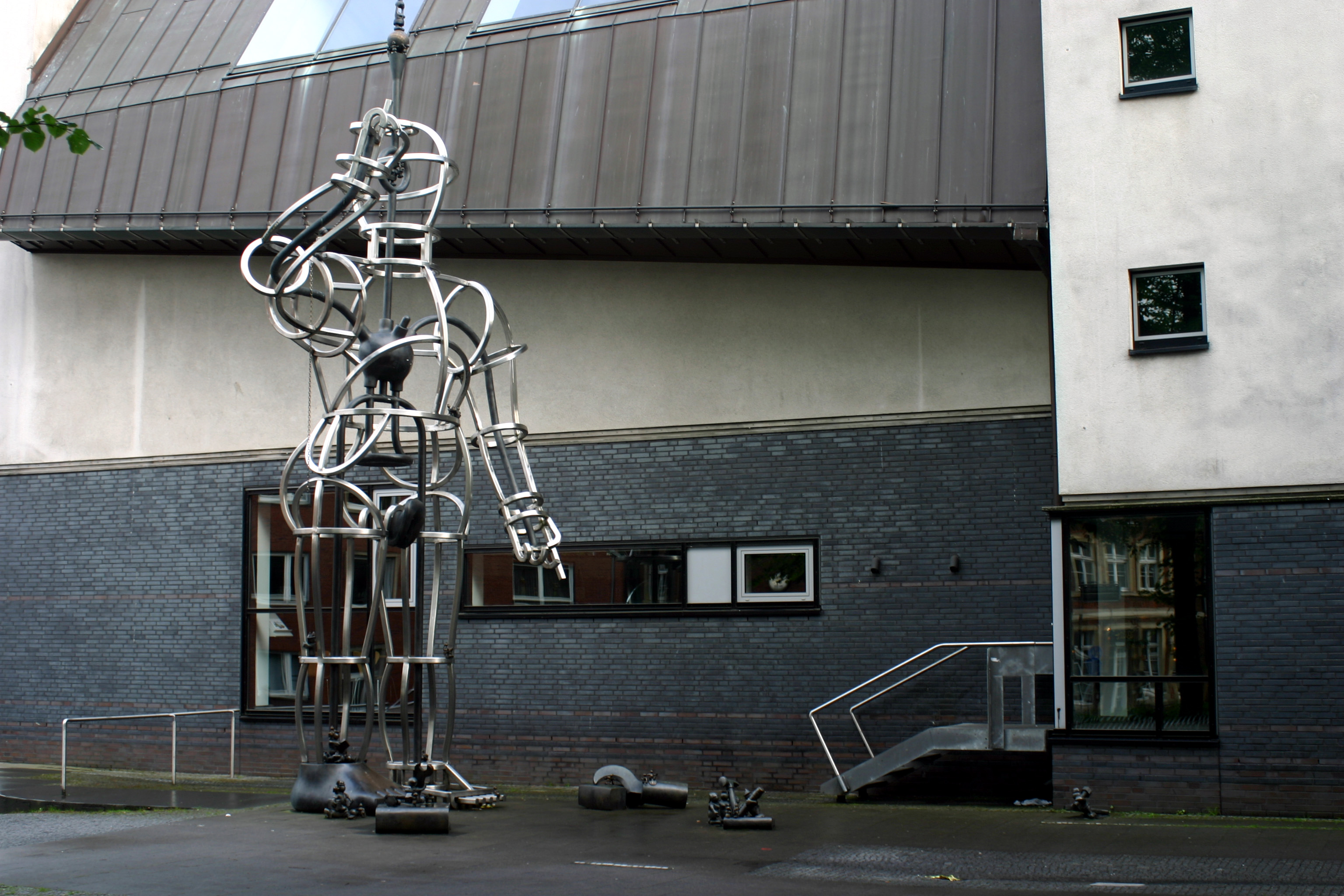 Der New Yorker Künstler Tom Otterness schuf eine acht Meter hohe Skulptur auf der Büchereigasse. Diese weibliche Figur, genannt die "Überfrau", hat er in eine gerüstähnliche Form aus Edelstahl gebracht. Sie erscheint durchsichtig. In ihrem Inneren findet sich nur eine Andeutung eines bronzenen Kreislaufsystems. Die "Überfrau" nimmt Ansätze traditioneller Ikonographie auf - die weibliche Figur als Personifikation der Weisheit und Freiheit. Kleine in Bronze gegossene Figuren bewegen sich fleißig um die Skulptur.